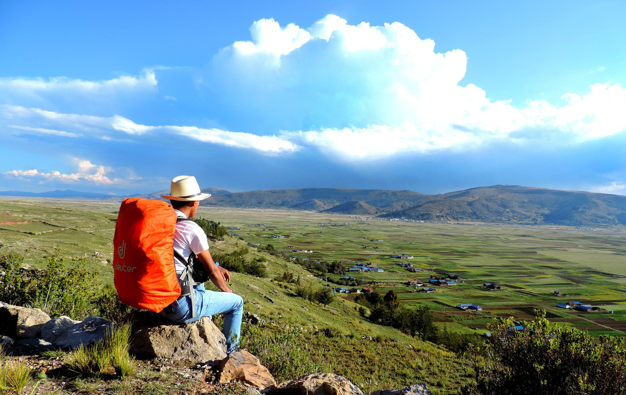 Platería Puno Peru